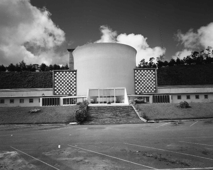 fachada